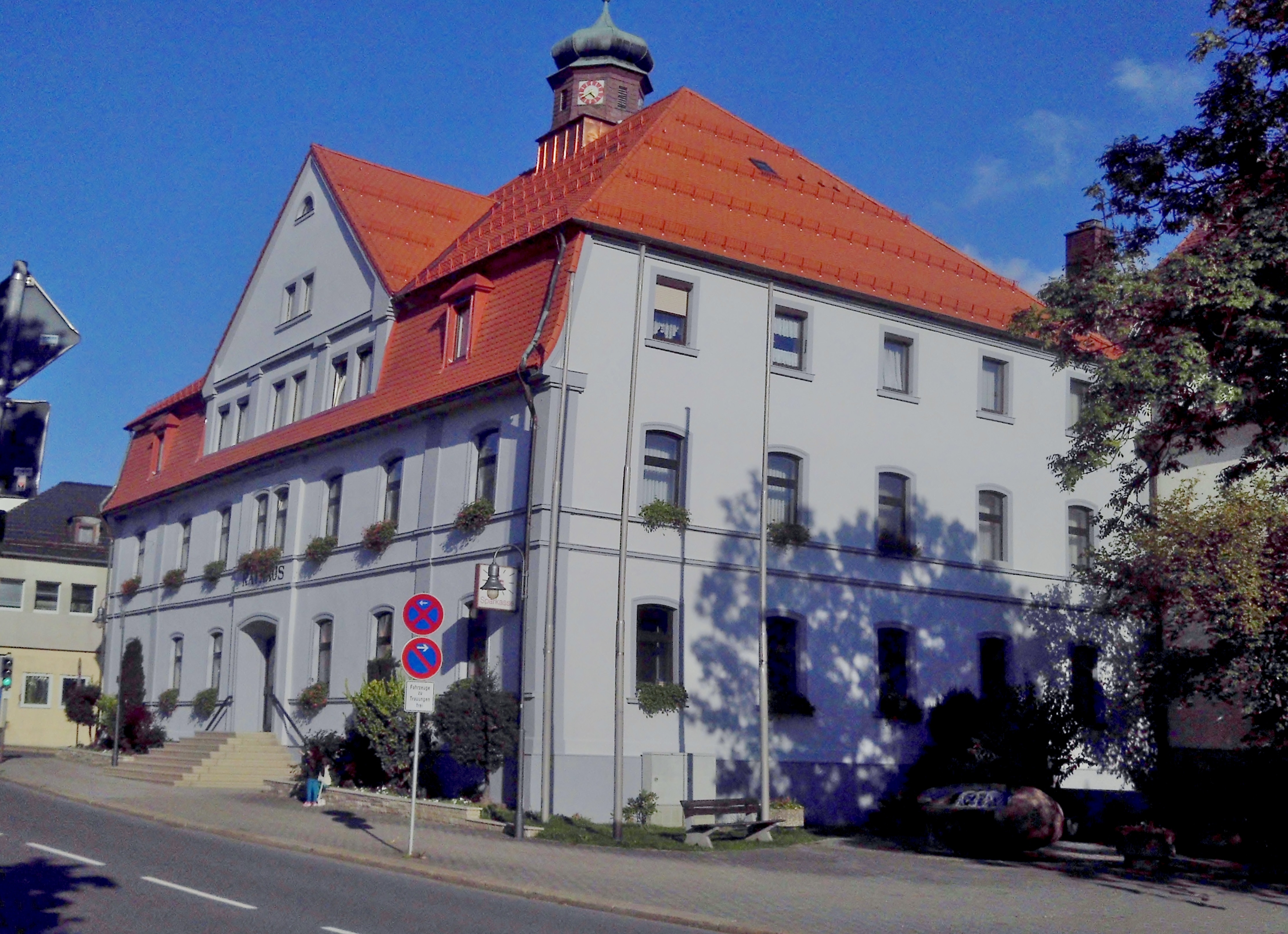 Rathaus Selbitz